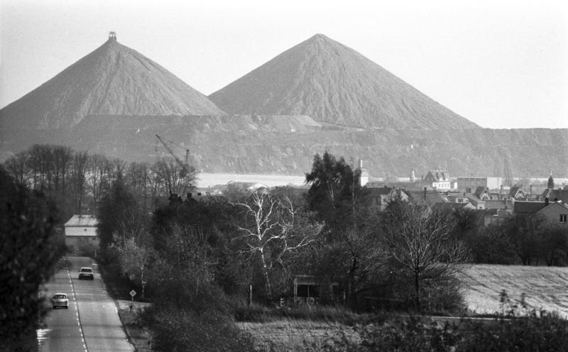 Thüringen, Abraumhalten, Uranbergbau ADN/Jan-Peter Kasper/ 9.11.90 Thüringen: Riesige Abraumhalden - entstanden durch jahrzehntelangen Uranbergbau in Thüringen und Sachsen - prägen die Landschaft um Ronneburg. Aus der früheren Erzbergbautradition und dem Uranbergbau der Wismut gibt es in dem betroffenen Gebiet etwa 3.000 Abraumhalden. Vor allem die Sickerwässer aus ihnen bringen eine enorme Belastung mit sich. Sie enthalten Uran und andere Radionuklide sowie chemisch toxische Stoffe und gelangen zumeist unkontrolliert in das Grund- und Oberflächenwasser.